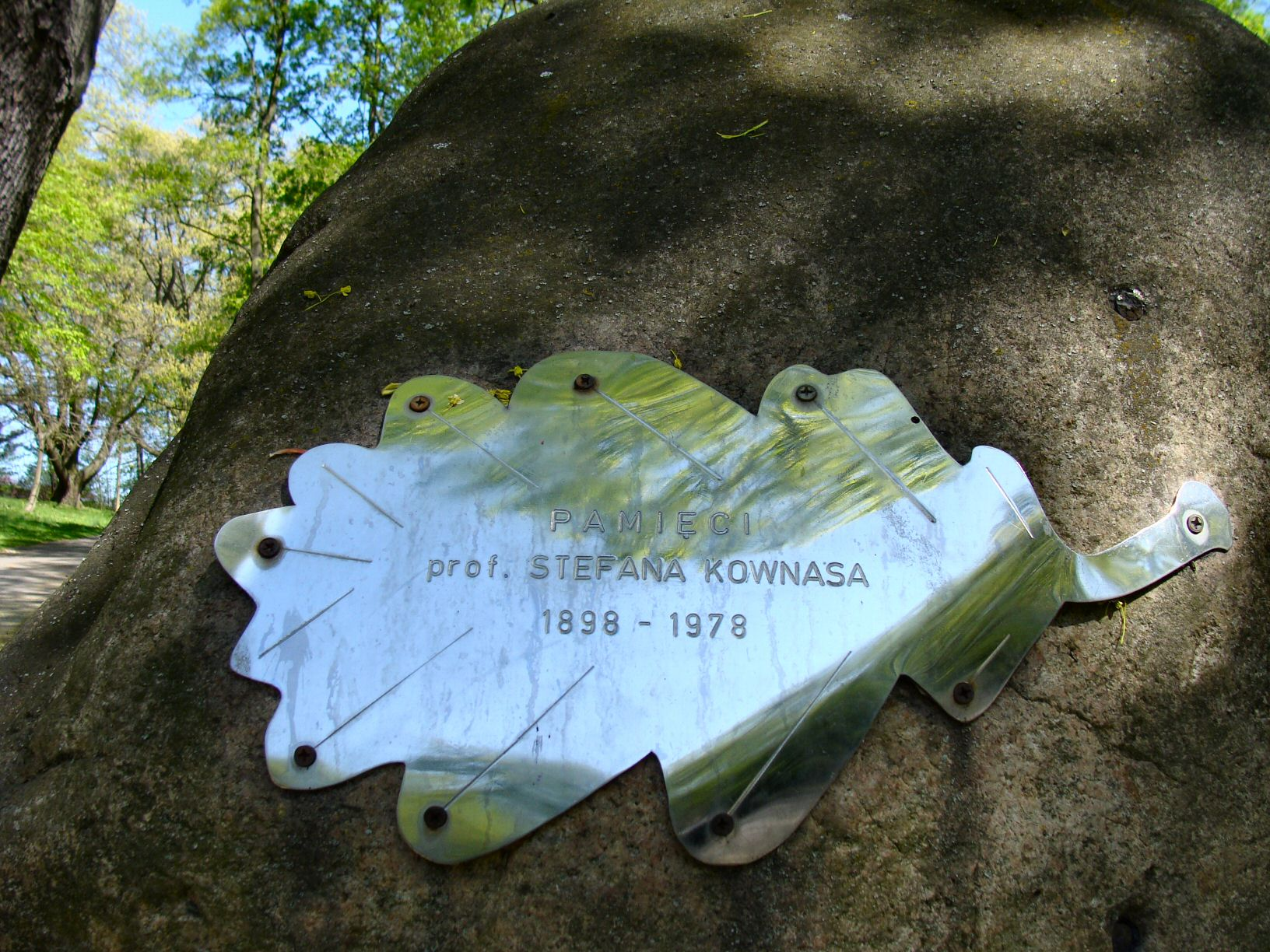 Pomnik upamiętniający Stefana Kownasa w Ogrodzie Dendrologicznym jego imienia w Szczecinie